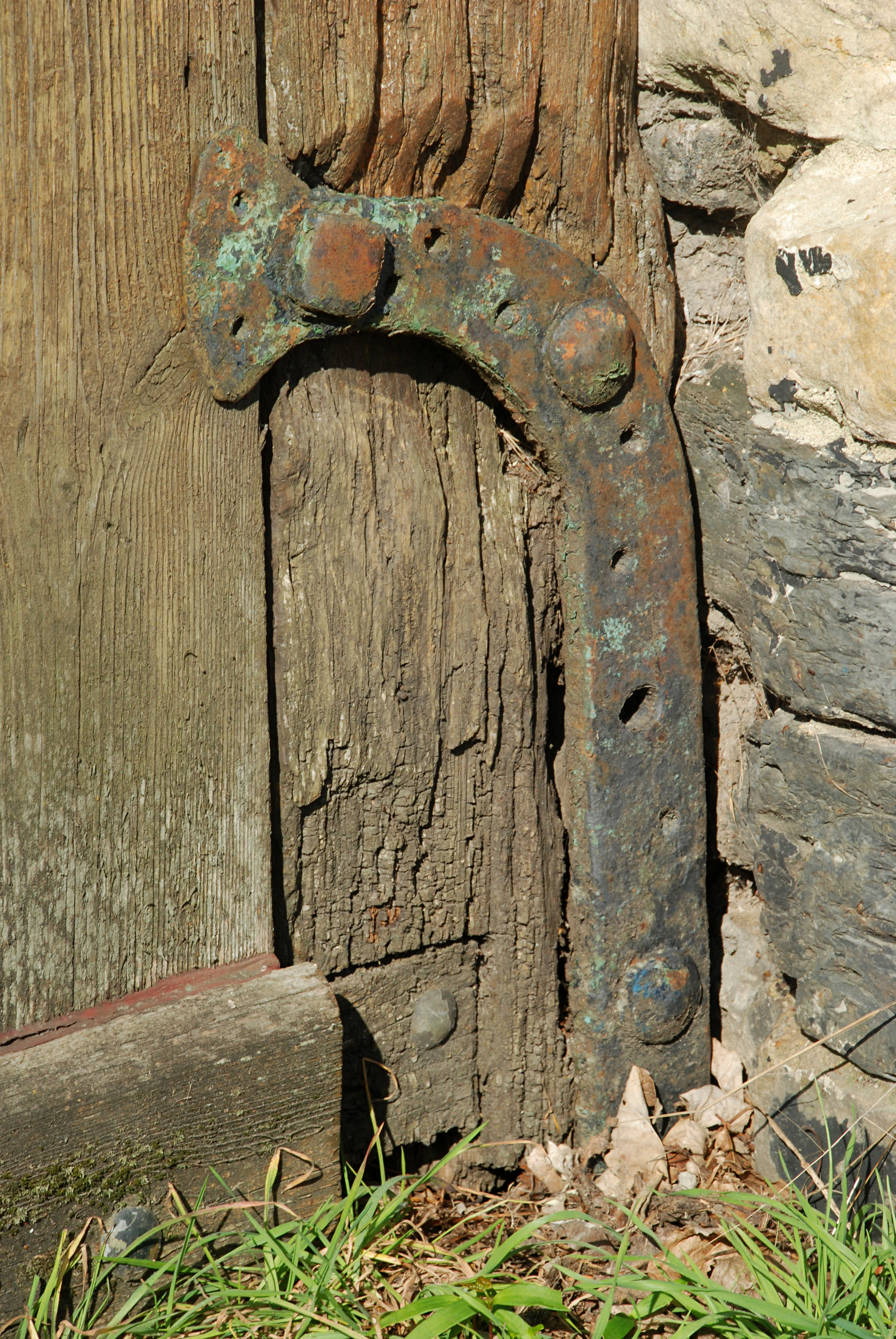 Belgique - Brabant wallon - Ottignies - Manoir de Franquenies